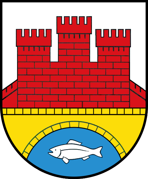 Wappen der Gemeinde Neuburg (Mecklenburg), Landkreis Nordwestmecklenburg, Mecklenburg-Vorpommern. „In Silber, im Schildfuß im blauen Gewässer mittig ein nach rechts gekehrter silberner Fisch, darüber eine gewölbte goldene Steinbogenbrücke, über die sich eine ausladende rote Burg mit drei Türmen und jeweils fünf überstehenden Zinnen erhebt.“[1] Am 22. Februar 2018[2] hat die Gemeindevertretung Neuburg die Annahme des vorstehend beschriebenen Wappens beschlossen, die der Innenminister von Mecklenburg-Vorpommern genehmigte. Die Urkunde dazu überreichte er der Bürgermeisterin Heidrun Teichmann am 28. Juli 2018[1]. Die Burg steht in dem von Peter Neichel und Jürgen Willbarth entworfenen Wappen für den Namen der Gemeinde und symbolisiert mit ihren drei Türmen den Zusammenschluss der drei Gemeinden Neuburg, Steinhausen (1959) und Hagebök (2002) zur heutigen Gemeinde. Jede der 15 Zinnen steht für eine der 15 Ortschaften der Gemeinde. Die stilisierte Steinbogenbrücke zur Burg versinnbildlicht die historisch gewachsenen Beziehungen sowohl zum Land Mecklenburg-Vorpommern als auch zu den nahe gelegenen Hansestädten Wismar und Lübeck. Der schwimmende Fisch soll den Naturreichtum der Gemeinde und die bedeutende wirtschaftliche Nutzung des Farpener Stausees veranschaulichen.